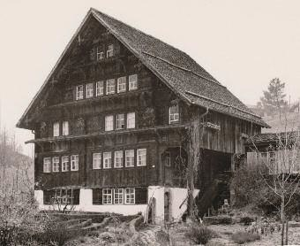 Das Ackerhus nach der Verschiebung 1951/52 am neuen Standort in Ebnat-Kappel